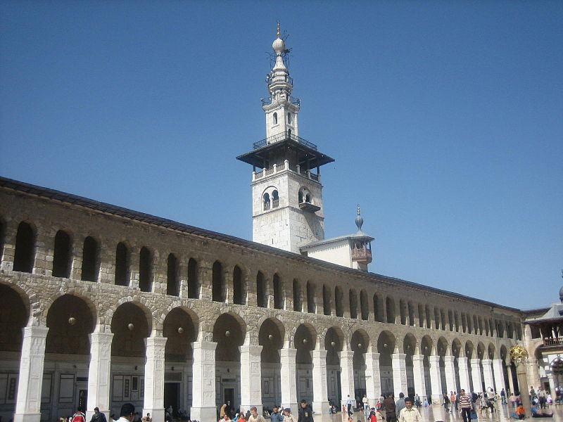 صورة للجامع الاموي في دمشق.